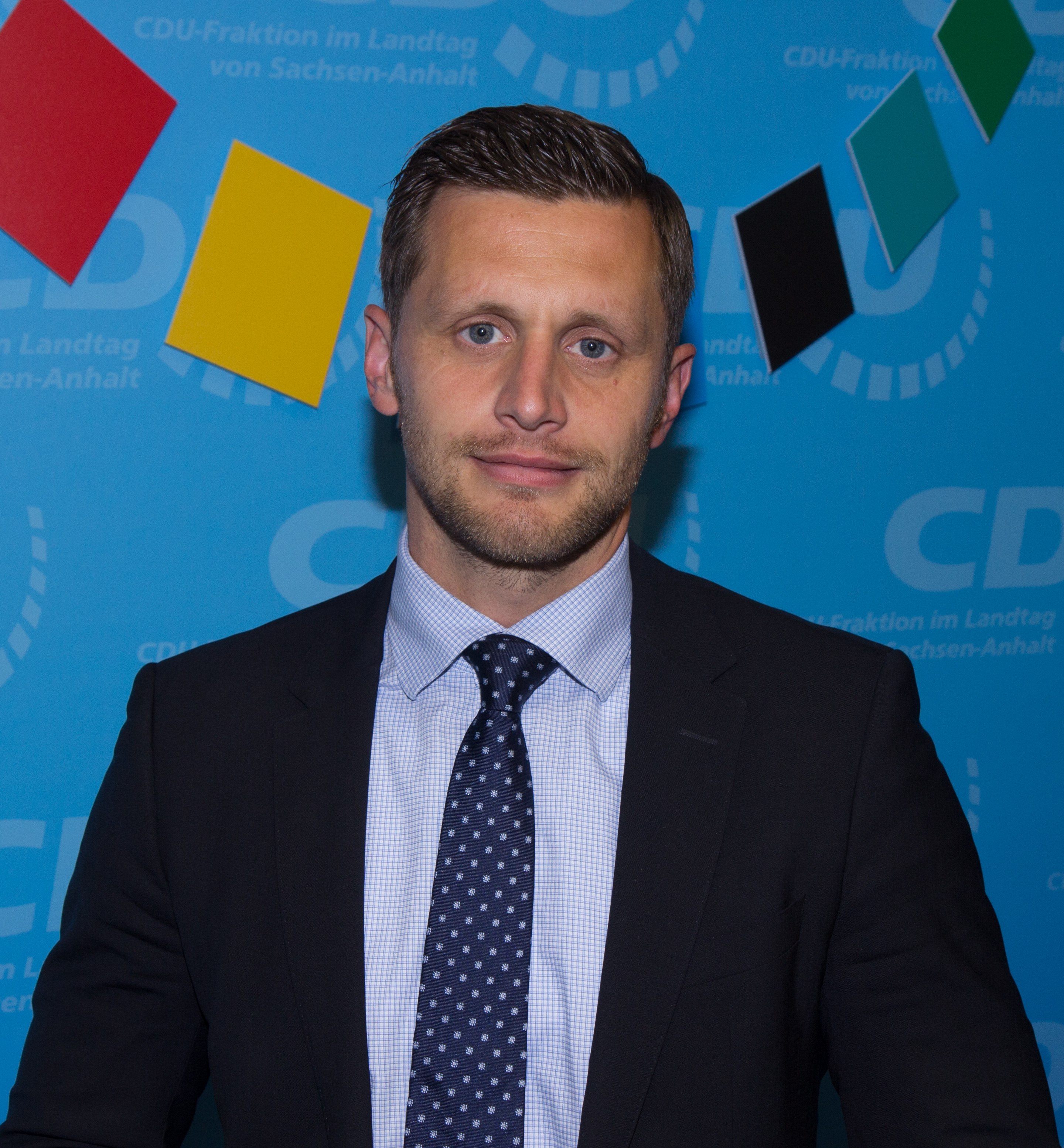 Chris Schulenburgt